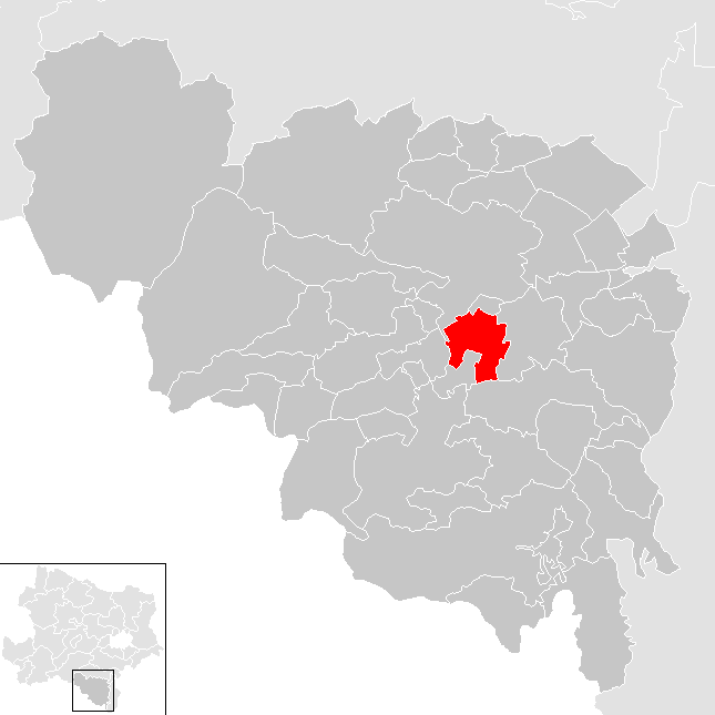 Bezirk Neunkirchen